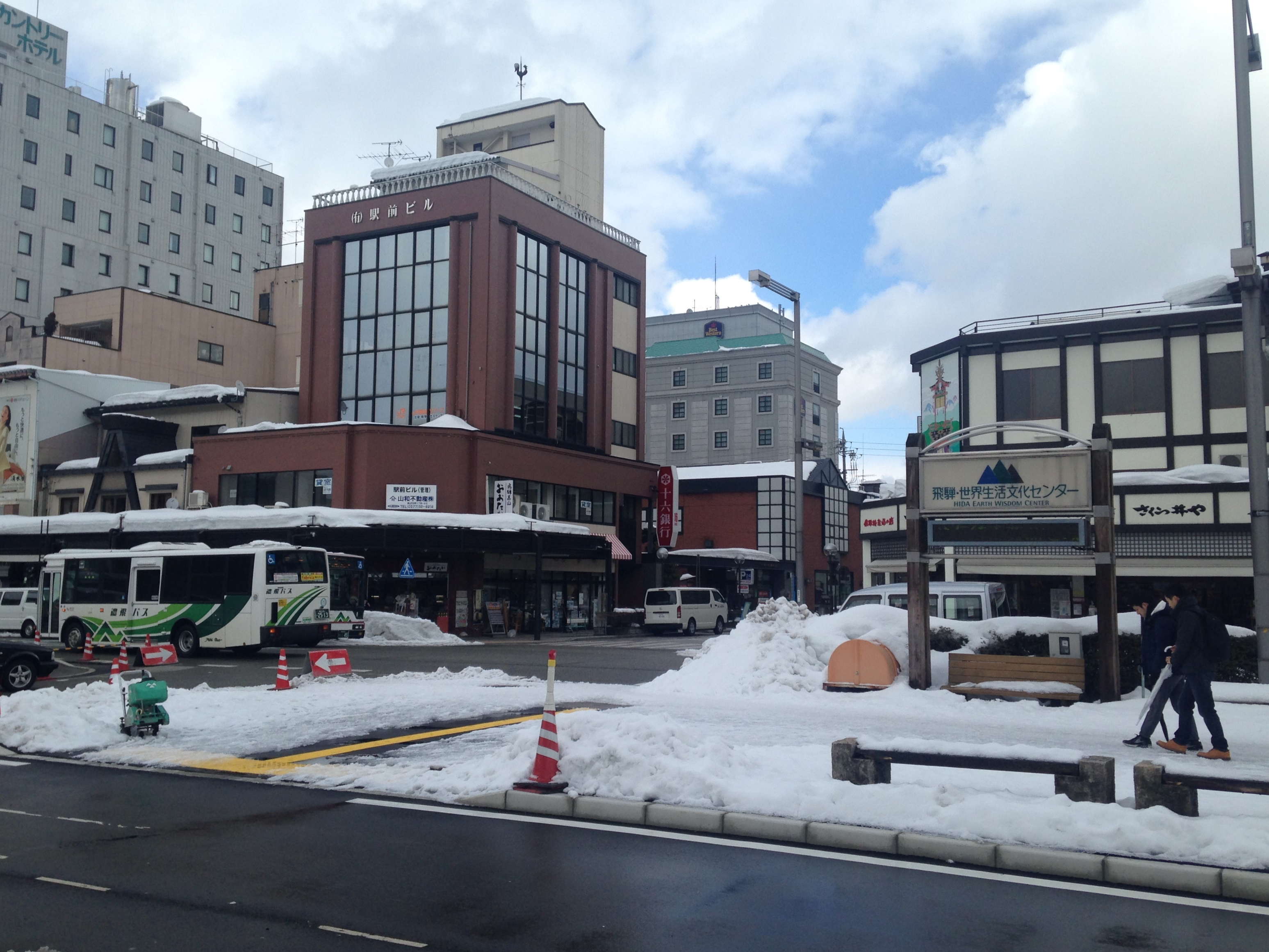 高山駅の駅前風景